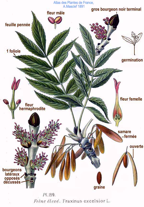 Fraxinus excelsior L.